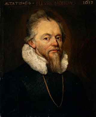 Portrait de Philippe Duplessis-Mornay, école flamande, musée d'arts de Nantes, 1613.